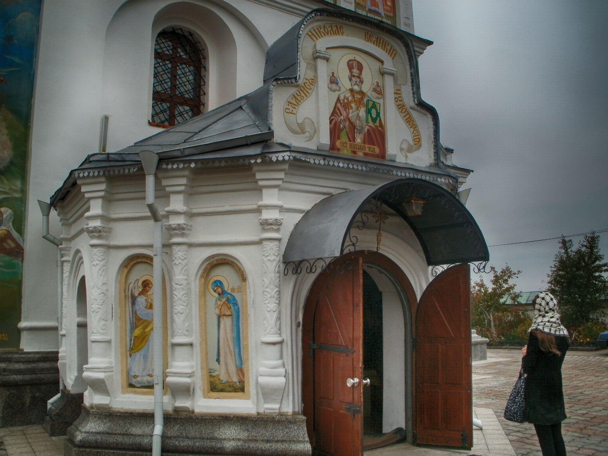 Беларуская (тарашкевіца): Комплекс Мікольскага манастыра ў межах агароджы:званіцажылы дом (шпіталь) Мікольская царквадэкаратыўнае аздабленьне царквы: фрэскі сюжэтныя, фрэскі арнаментальныя, іканастас, арнаментальная ляпнінаАнуфрыеўская царкваагароджа з уязной брамай. г. Магілёў This is a photo of Belarusian heritage monument. Reference number: 511Г000017 ( WLM)